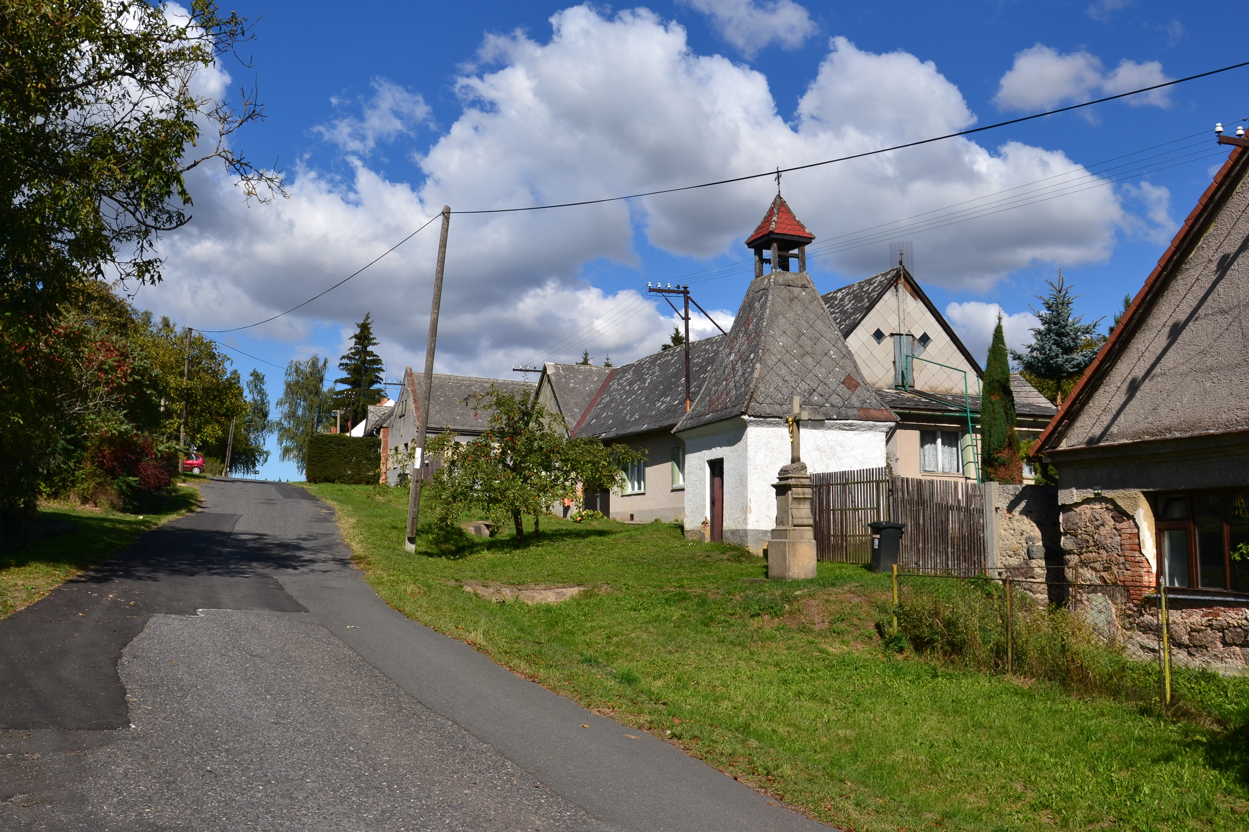 Silnice k Zdeslavi